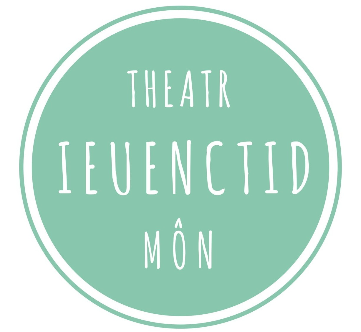 Logo Theatr Ieuenctid Mon